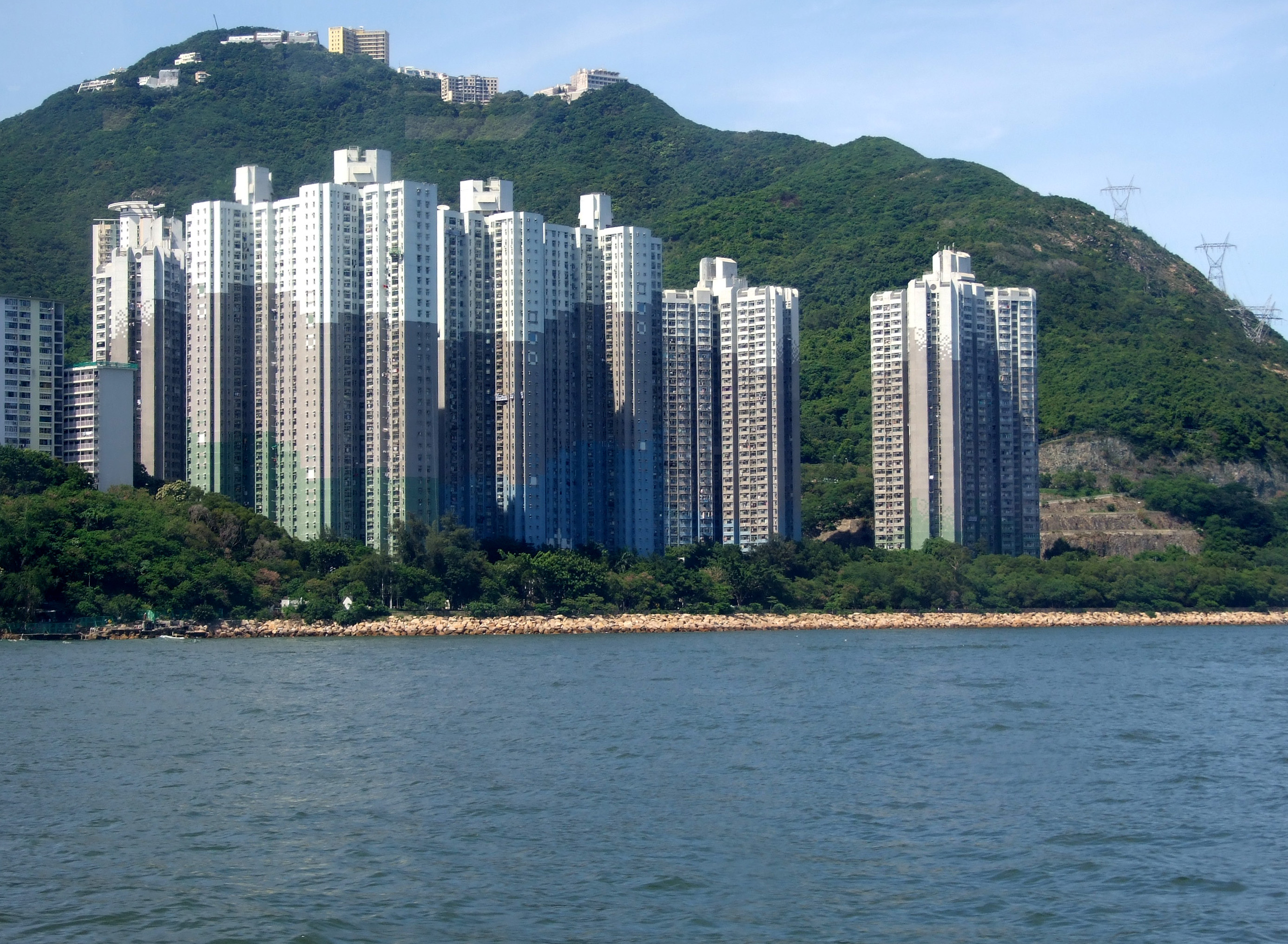 中文（香港）: 華貴邨